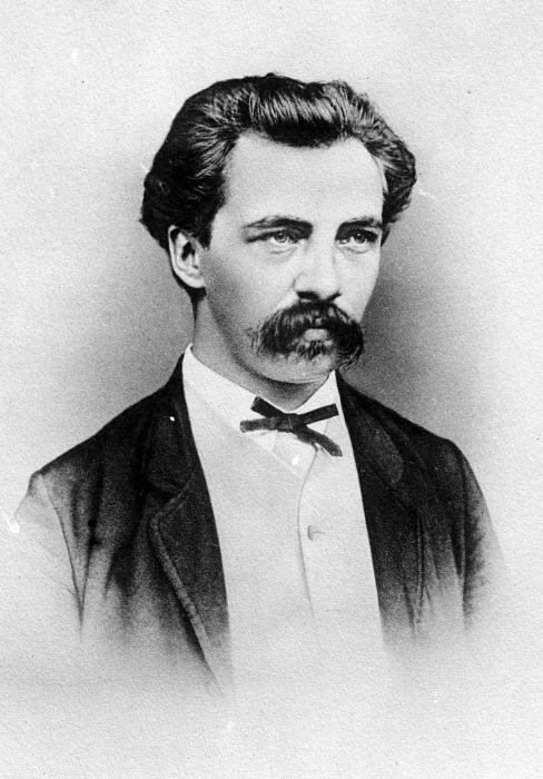 Repronegatief. Portret van R.H.C.C. Scheffer, directeur van 's Lands Plantentuin in Buitenzorg